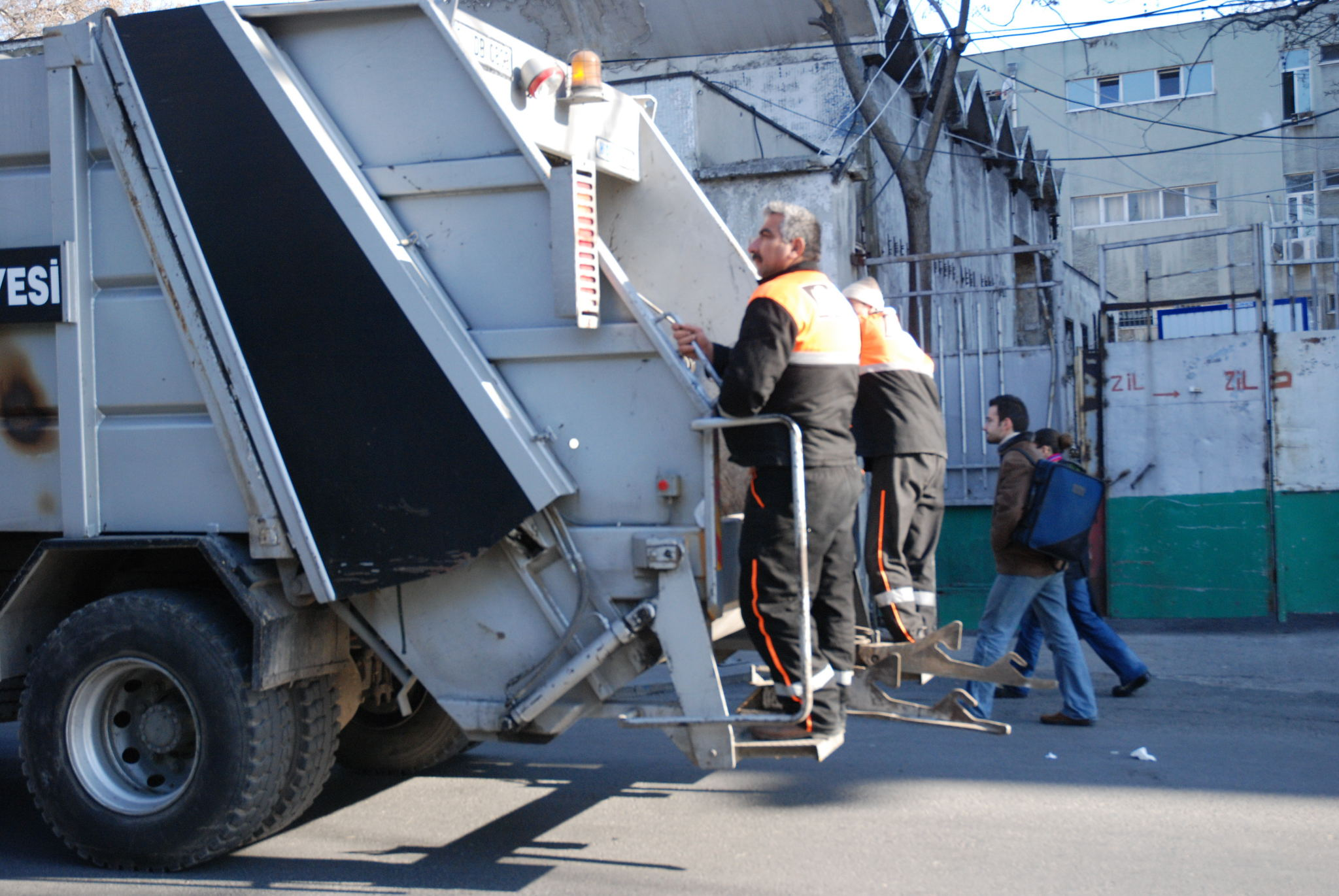 Çöp arabasında çöpçüler.